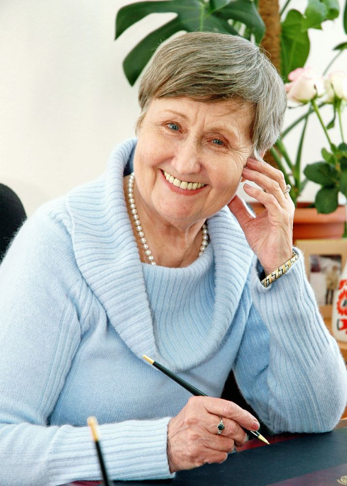 Шляхова Нонна